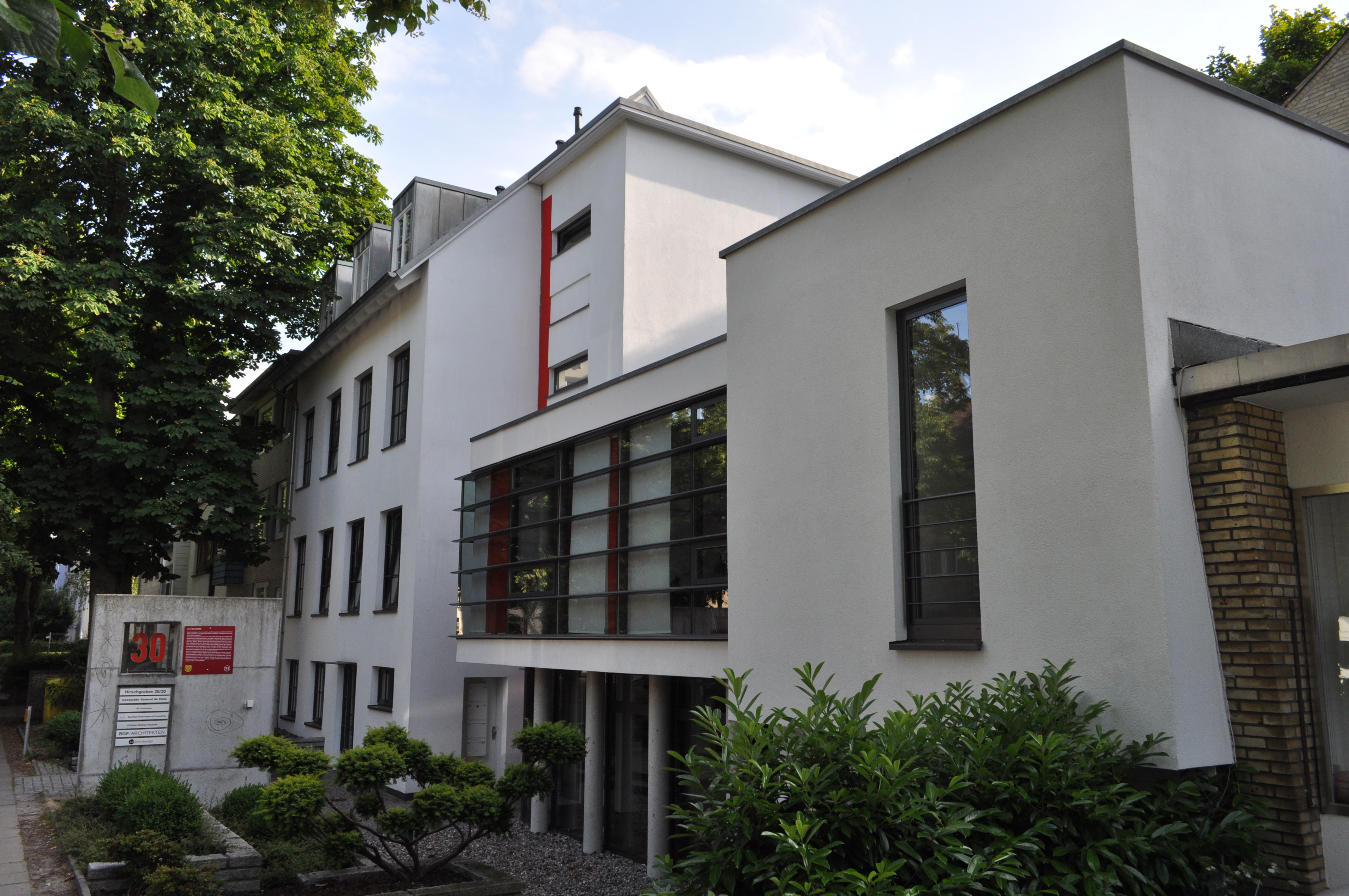 Hirschgraben 30 in Hamburg-Eilbek, Sitz des Generalkonsulats der Republik Chile.